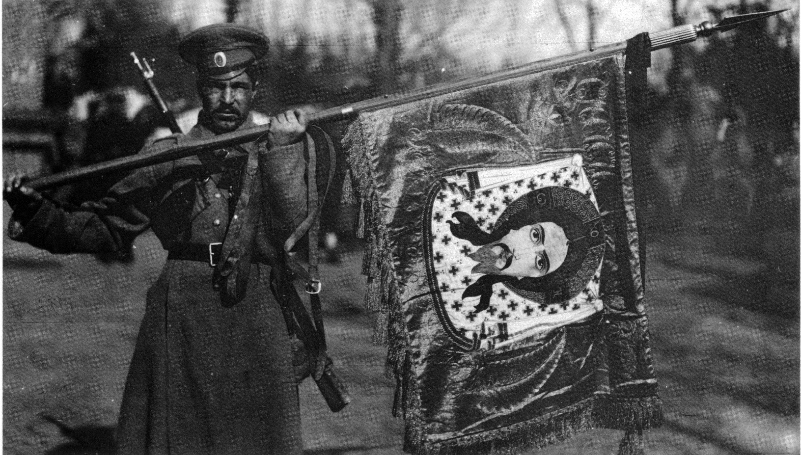 Личный значок генерала Ф.А. Келлера, преподнесенный чинами 10-й кавалерийской дивизии своему бывшему начальнику. Фото из личного альбома графа Келлера (ЦГКФФА Украины им. Г.С. Пшеничного)